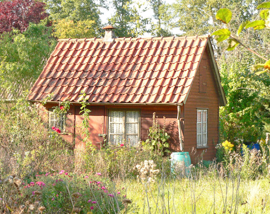 Gartenhaus (denkmalgeschützt) von etwa 1940 am Hermann-Löns-Park Hannover Foto aufgenommen von Benutzer Benutzer:AxelHH, September 2006